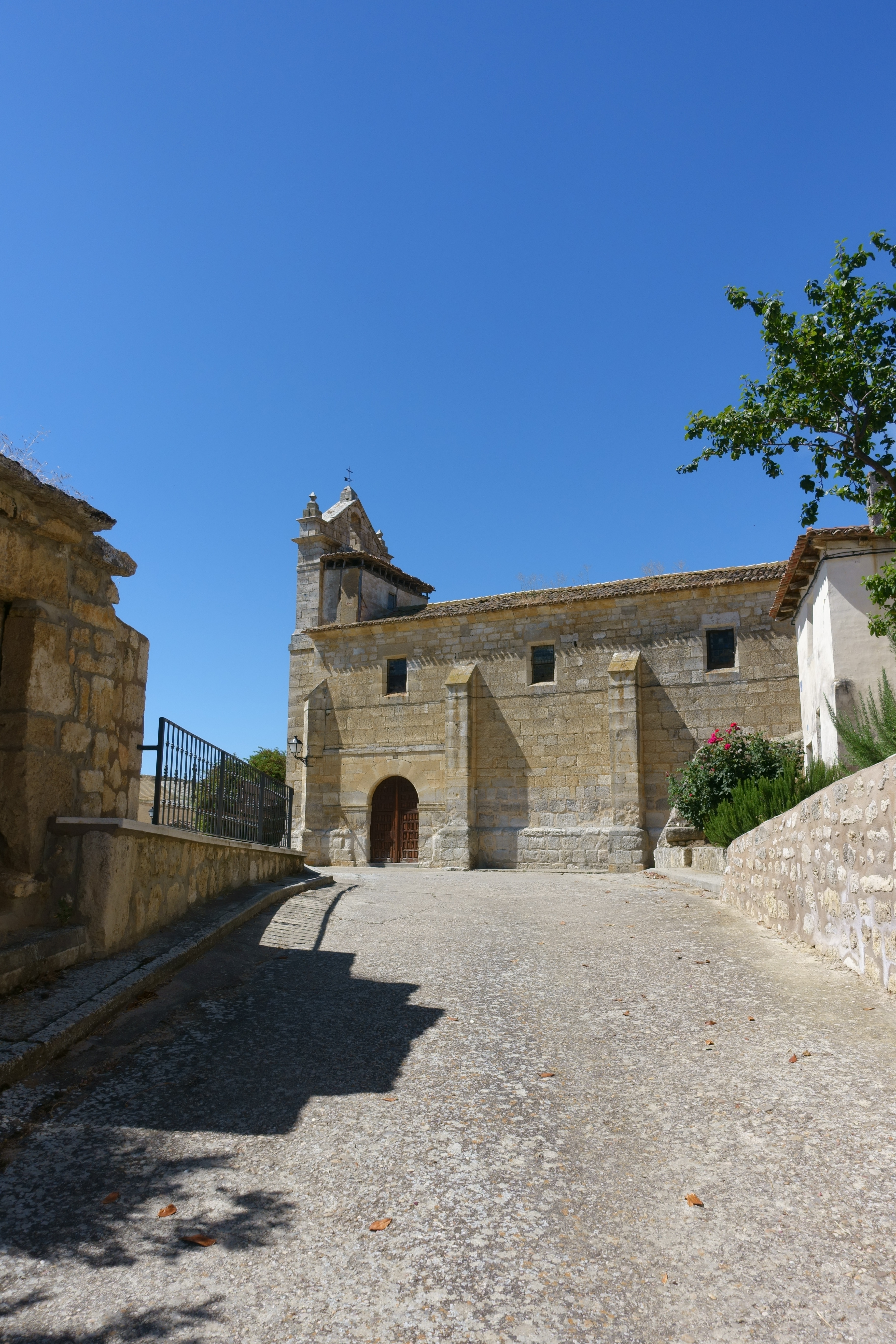 Iglesia de San Pedro Apóstol, Villamedianilla (Burgos, España).